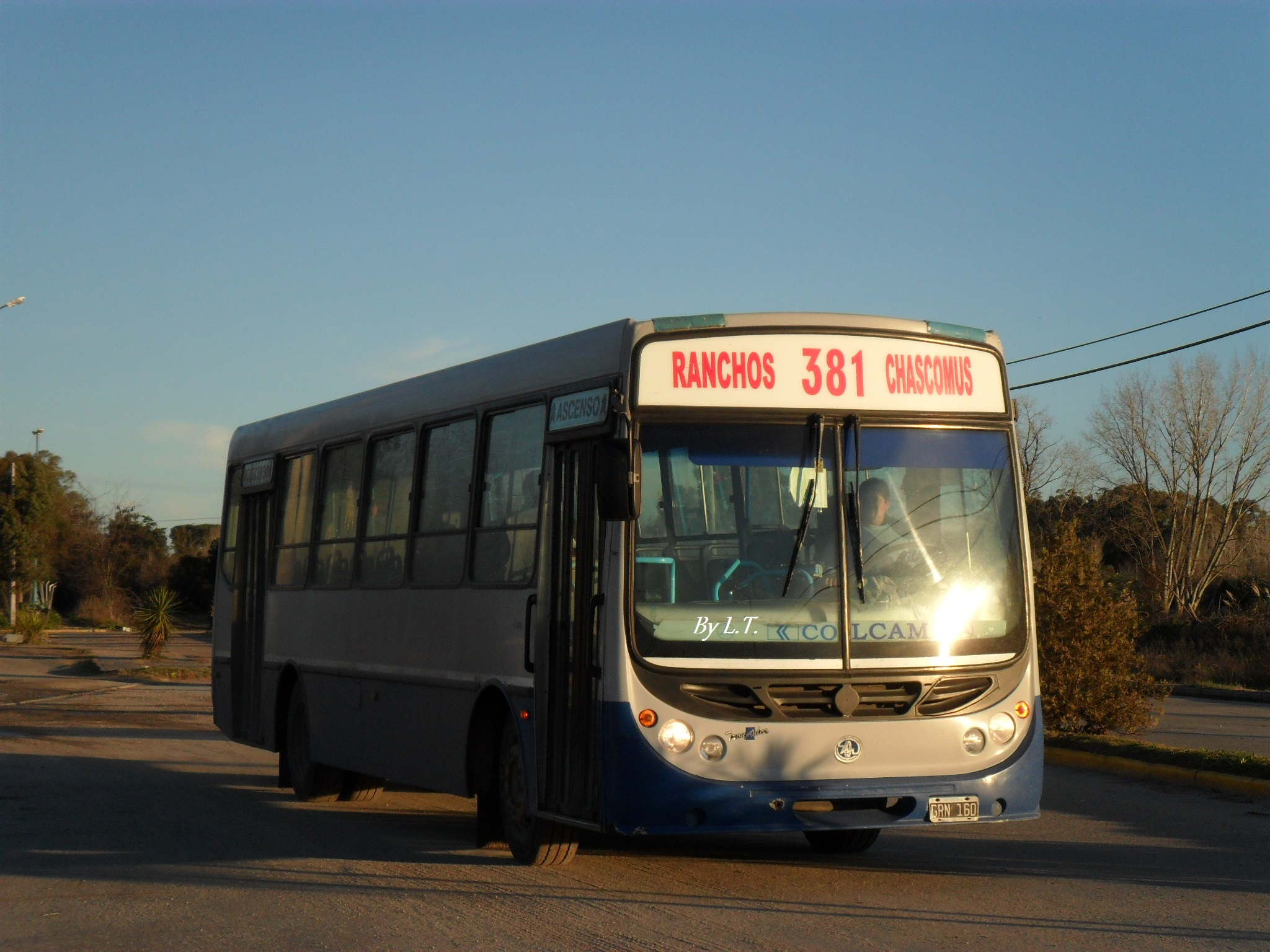 Saliendo de la Terminal de Chascomus a hacia Ranchos por la calle Balcarce